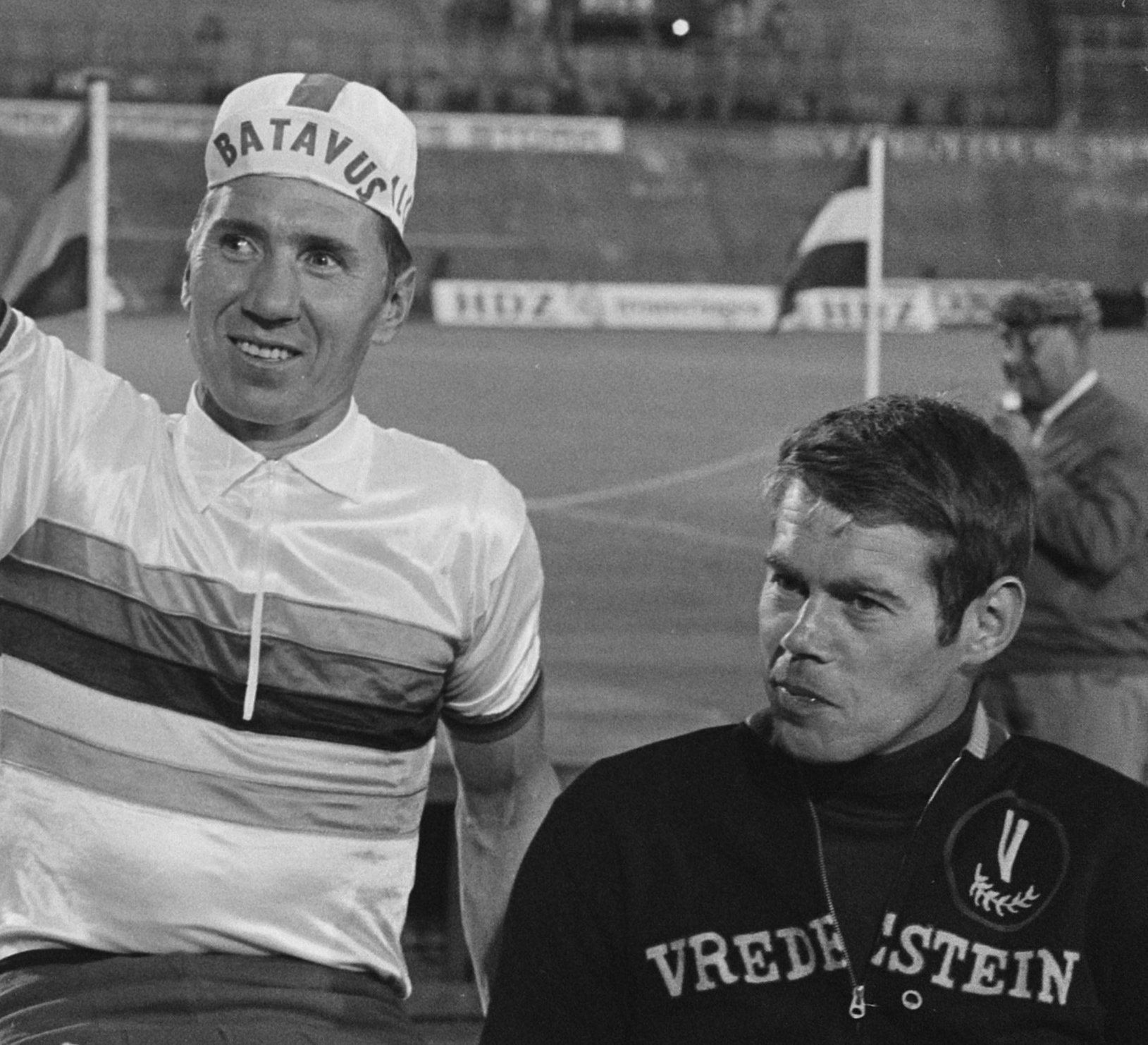 Collectie / Archief : Fotocollectie Anefo Reportage / Serie : [ onbekend ] Beschrijving : Revanches wereldkampioenschappen wielrennen in Olympisch Stadion Amsterdam; huldiging Cees Stam, Rudolph (Duitsland), gangmaker Walraven Datum : 20 augustus 1970 Locatie : Amsterdam, Noord-Holland Trefwoorden : huldigingen, sport, stayers, wielrennen Persoonsnaam : Stam, Cees Fotograaf : Verhoeff, Bert / Anefo Auteursrechthebbende : Nationaal Archief Materiaalsoort : Negatief (zwart/wit) Nummer archiefinventaris : bekijk toegang 2.24.01.05 Bestanddeelnummer : 923-7677